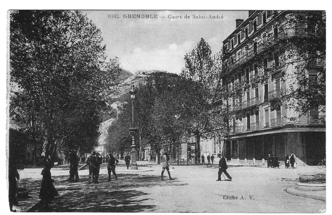 Grenoble, cours Saint André avant qu'il ne prenne le nom de cours Jean Jaurès